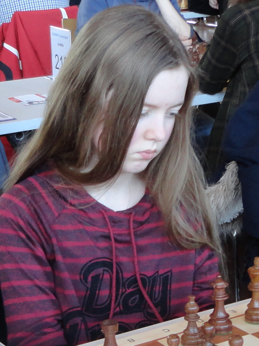 Annmarie Mütsch, Grenke Chess Open 2016 in Karlsruhe.